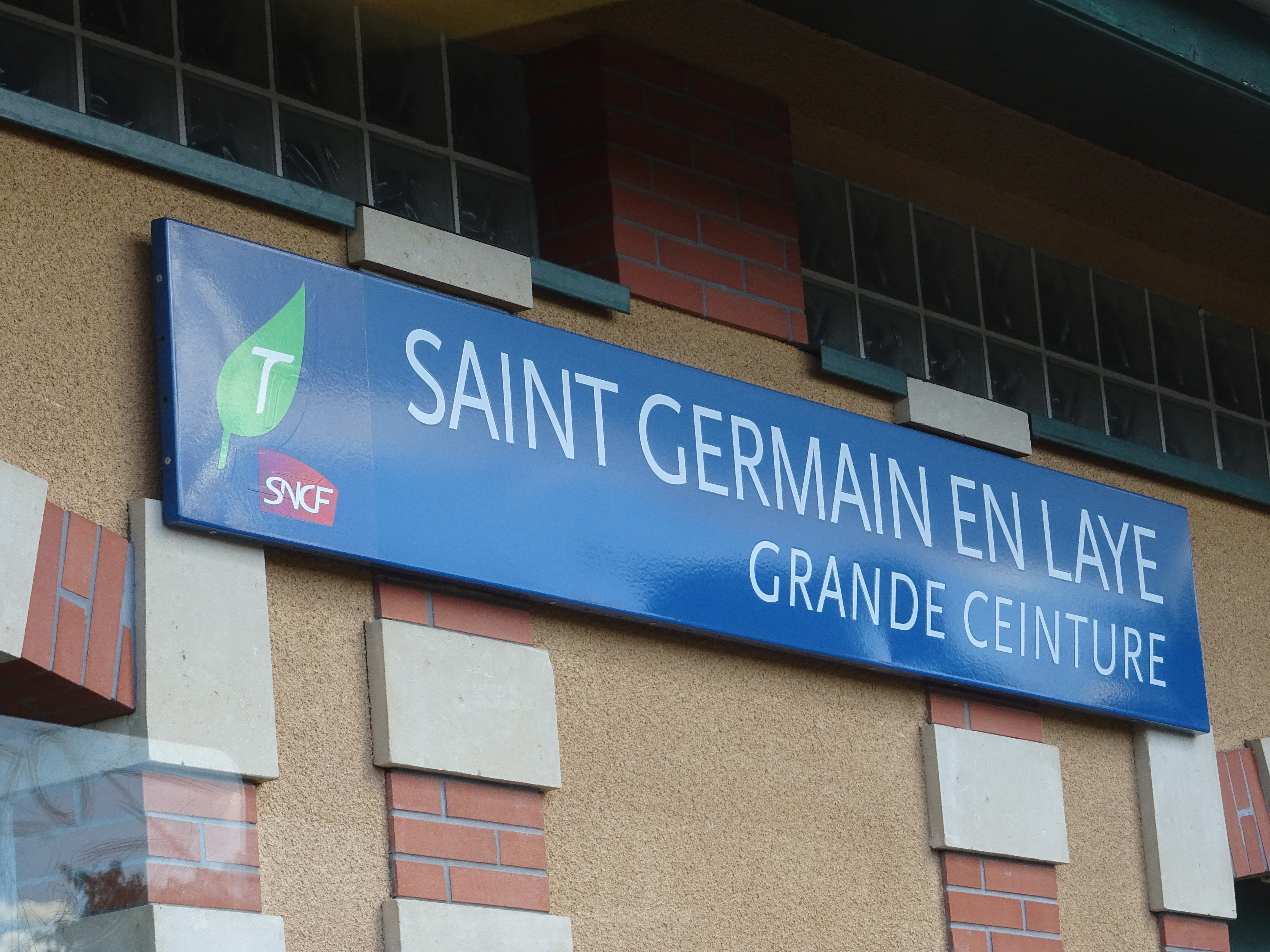 Panneau nom de la gare Saint-Germain-en-Laye-Grande-Ceinture